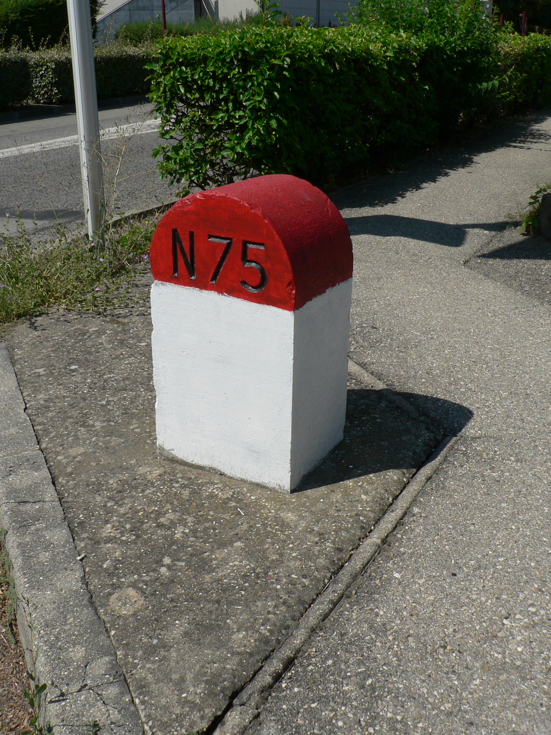 borne routière N75 à Varces. Varces-Allières-Risset, Isère, AuRA, France.